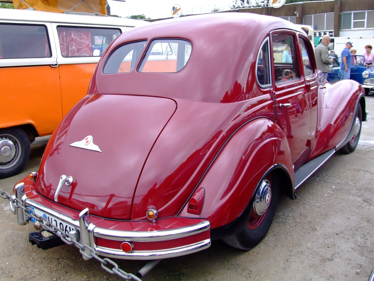 Quelle: selbst fotografiert, 07/2007 Fotograf: Späth Chr.